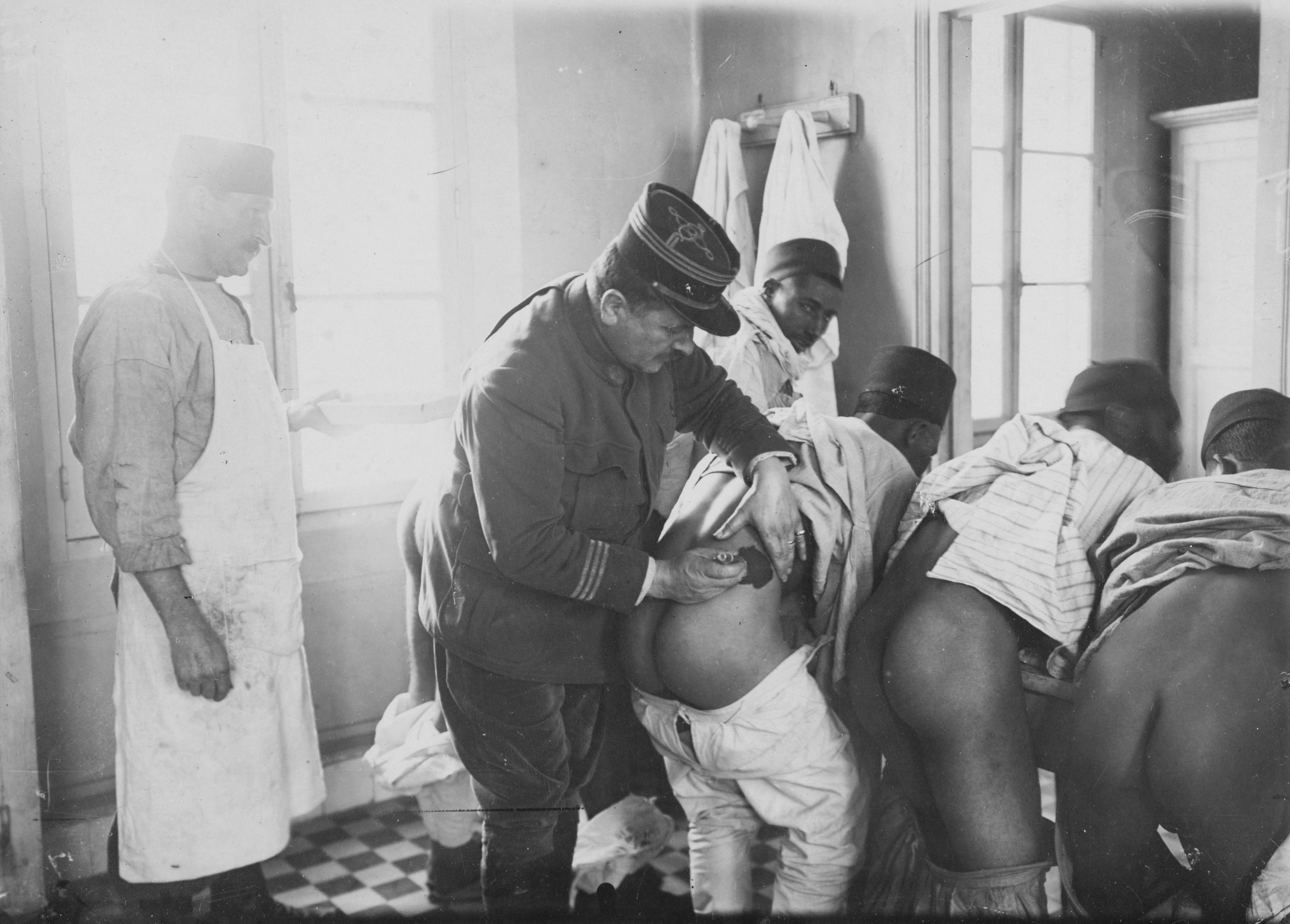 Blida? – Infirmerie Bigot ( 1er tirailleurs Algériens) traitement de la Syphilis par injections bi- iodure. Sykepleier vaksinerer mot syfilis. Arkivref.: RAFA-5032_U1_6-1.